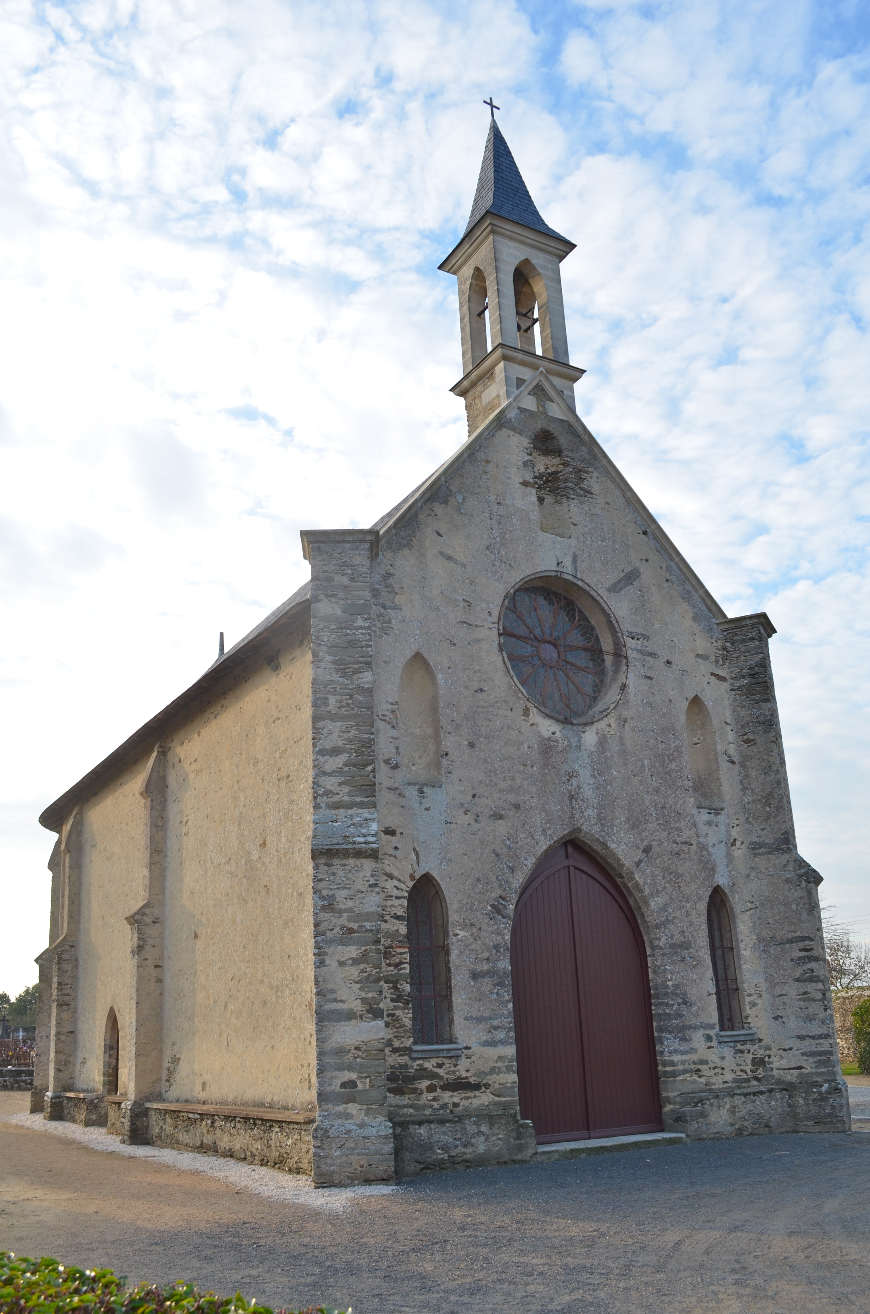 Chapelle du Pont - Paulx (Loire-Atlantique)